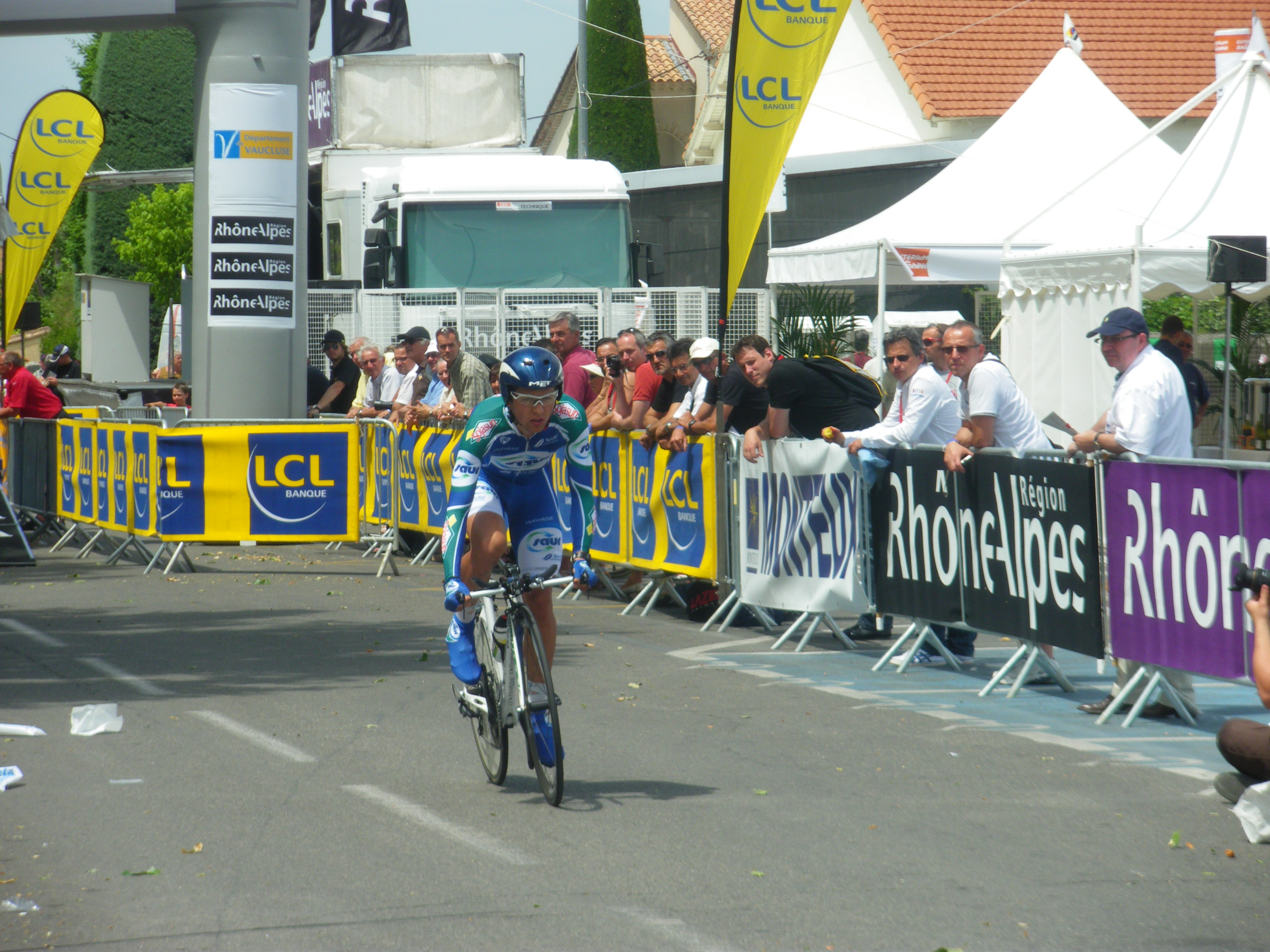 Julien Simon au départ de la 3ème étape du Critérium du Dauphiné Libéré 2010 (Monteux - Sorgues)